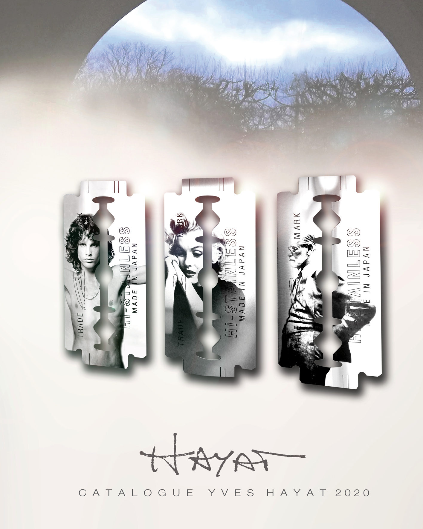 Couverture du Catalogue Yves Hayat 2020, 144 pages. Oeuvres présentées en couverture : Lames de fond 2020